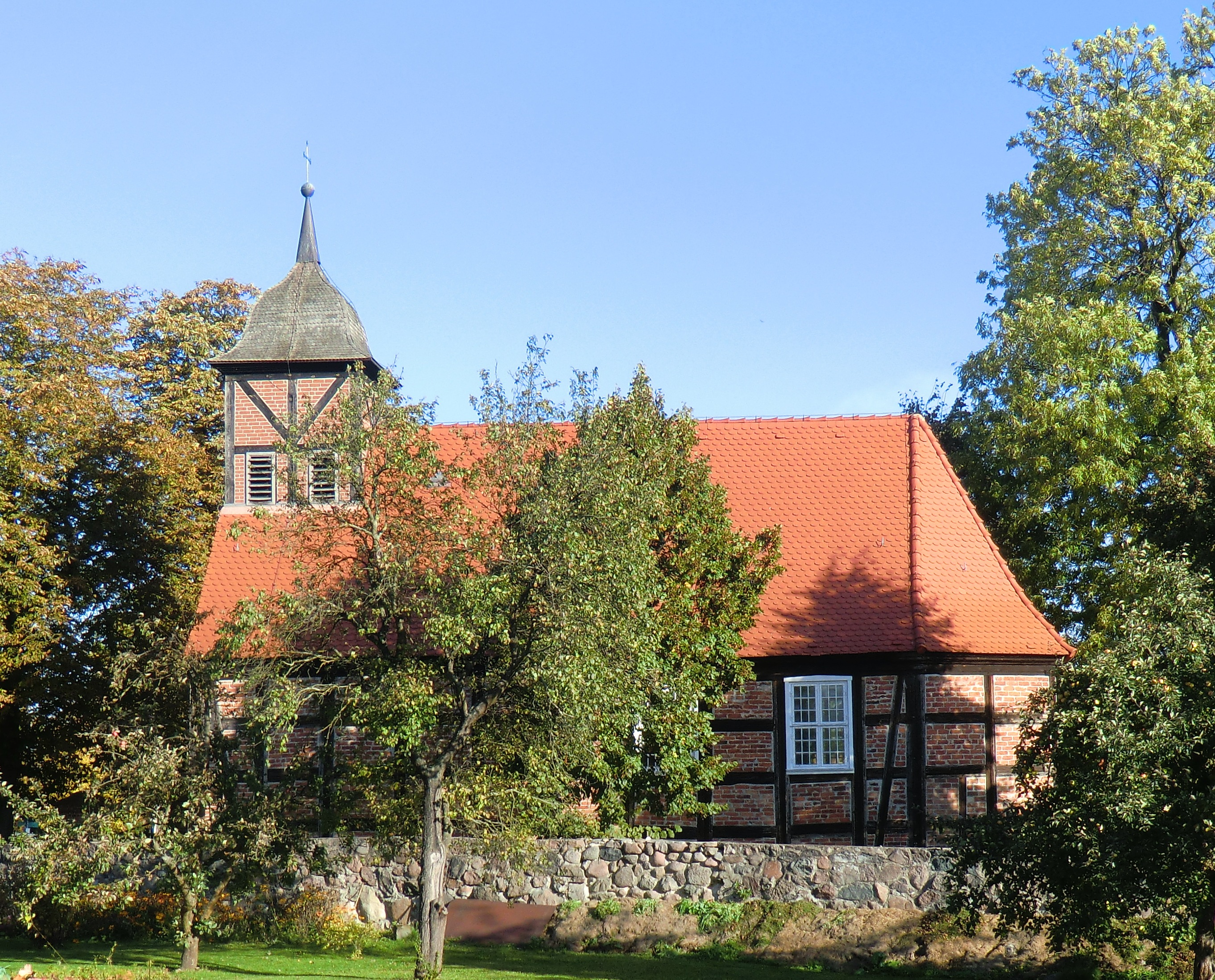 Dorfkirche in Krugsdorf vom Schloss aus betrachtet.